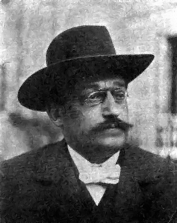 Filippo Bottazzi